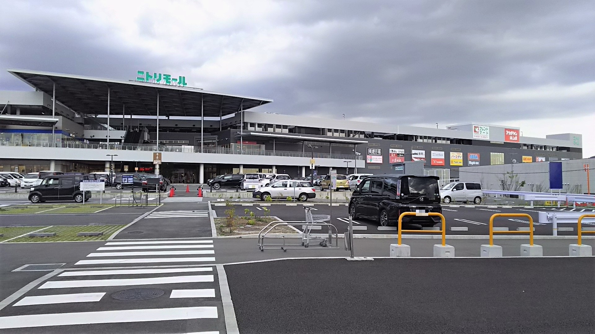 ニトリモール枚方 センターコートとサウスコート（大阪府枚方市）